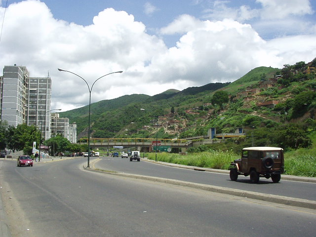 image/jpeg) メディアビューアーで開く配列図 ルイスピネダ駅 撮影位置: ベネズエラ、首都地区、リベルタドル市。ルイスピネダ駅前の道路の南側歩道から、西向き。 撮影日: 2004年6月27日。 撮影者: Kinori（投稿者と同じ）。 画像形式: JPEG形式、640x480ピクセル、色数24bit。 道路に歩道橋がかかっている。その右に接続している建物が駅。